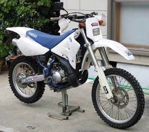 Yamaha DT200R